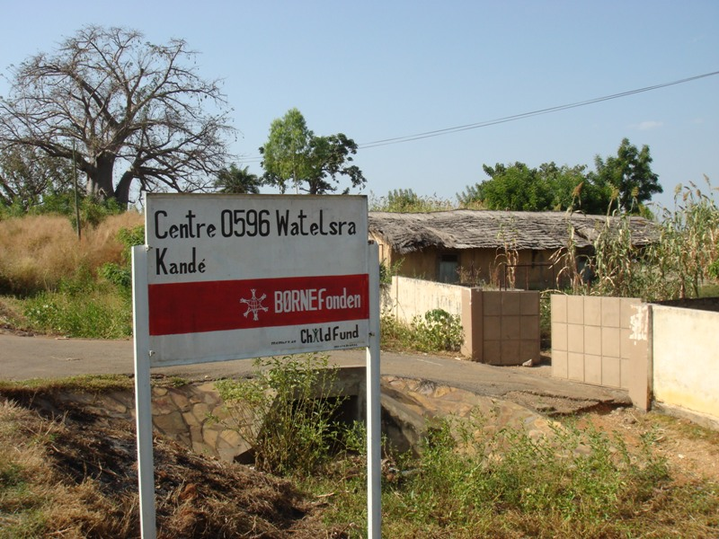 Børnefonden Centre 0596 Watelsra, Kandé Togo